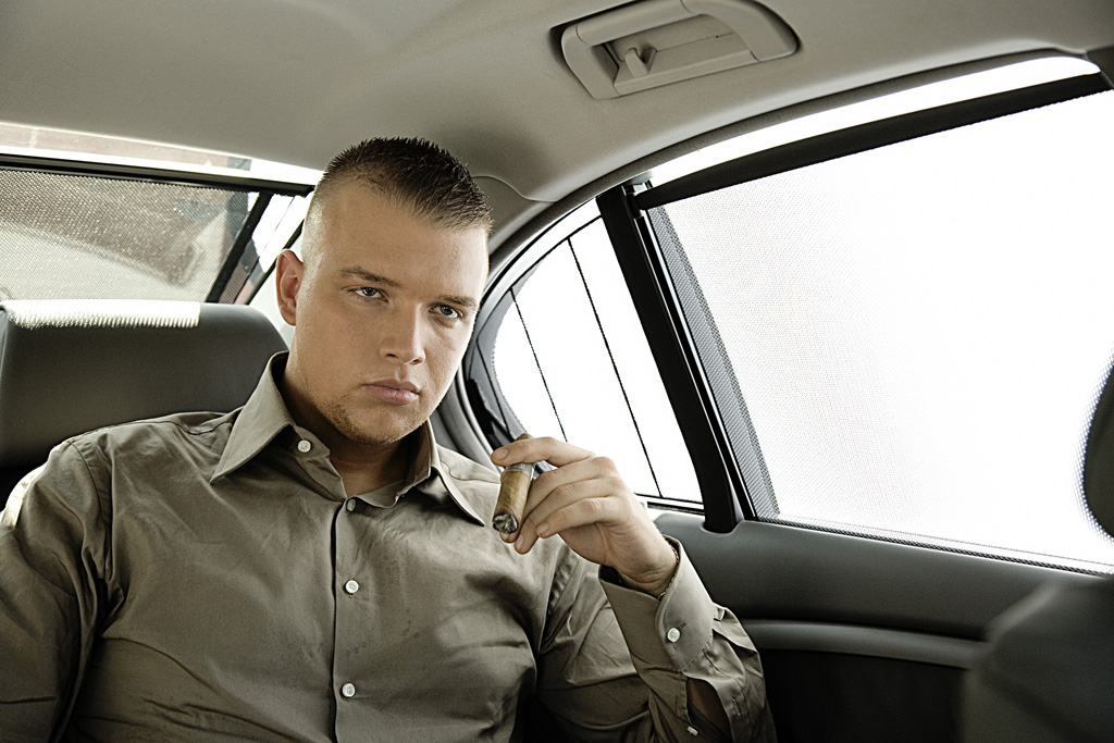 Pressefoto des Rappers Kollegah